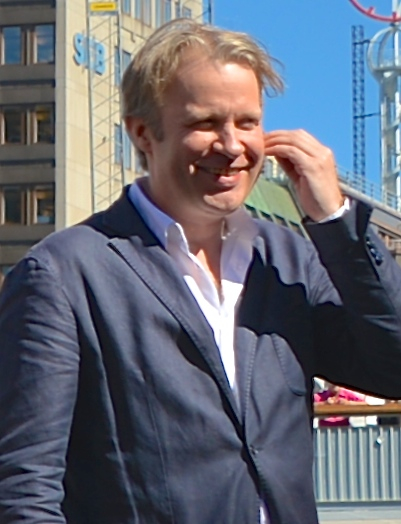 Eirik Stubø på Stockholms kulturfestival 2013.